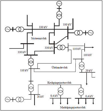 Elektrisüsteemi skeem